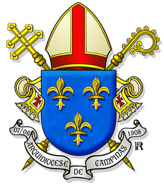 Brasão Eclesiástico da Arquidiocese de Campinas, SP., Brasil